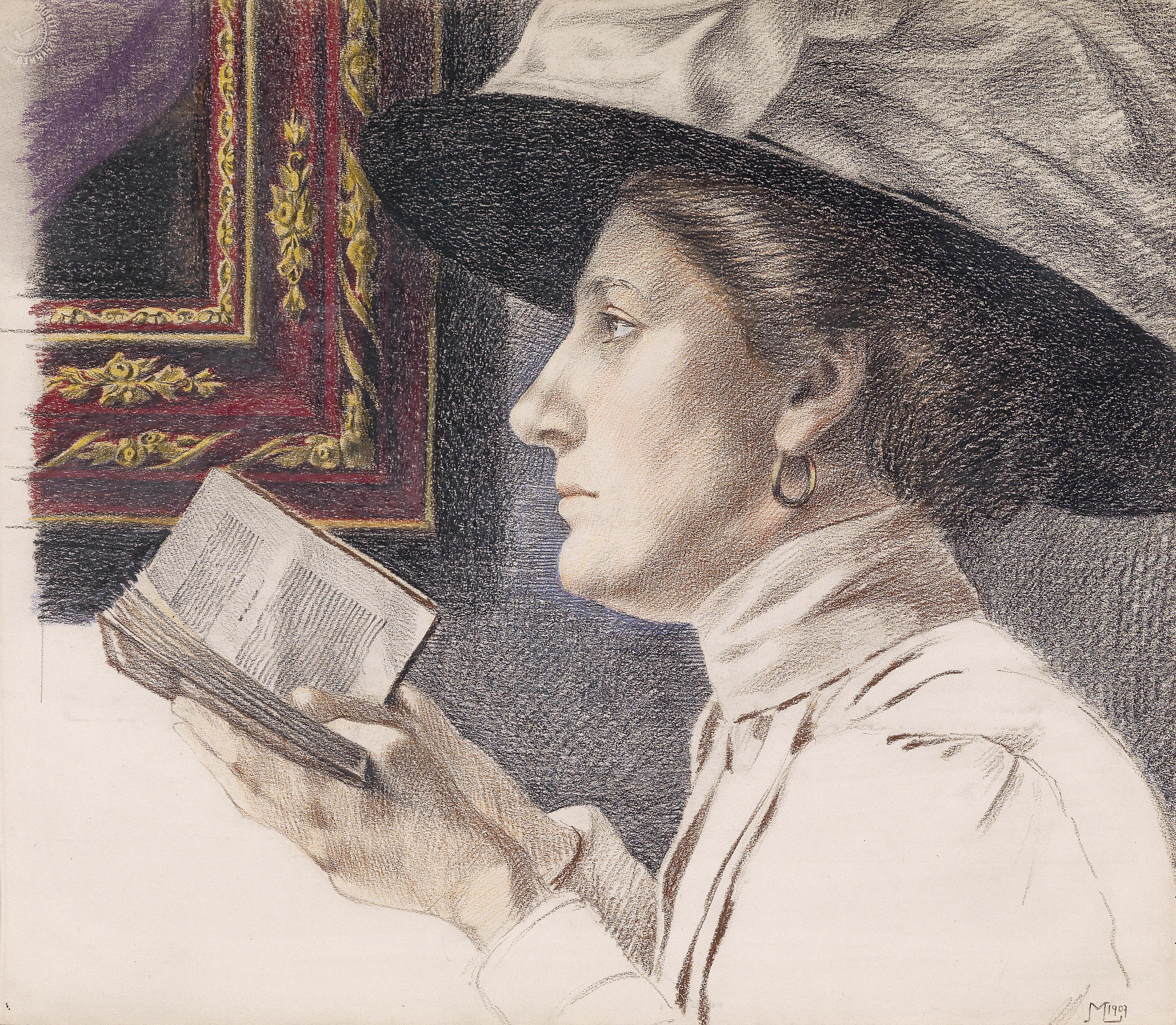 Porträt einer Dame, ein Buch lesendPortrait of a woman, reading a book